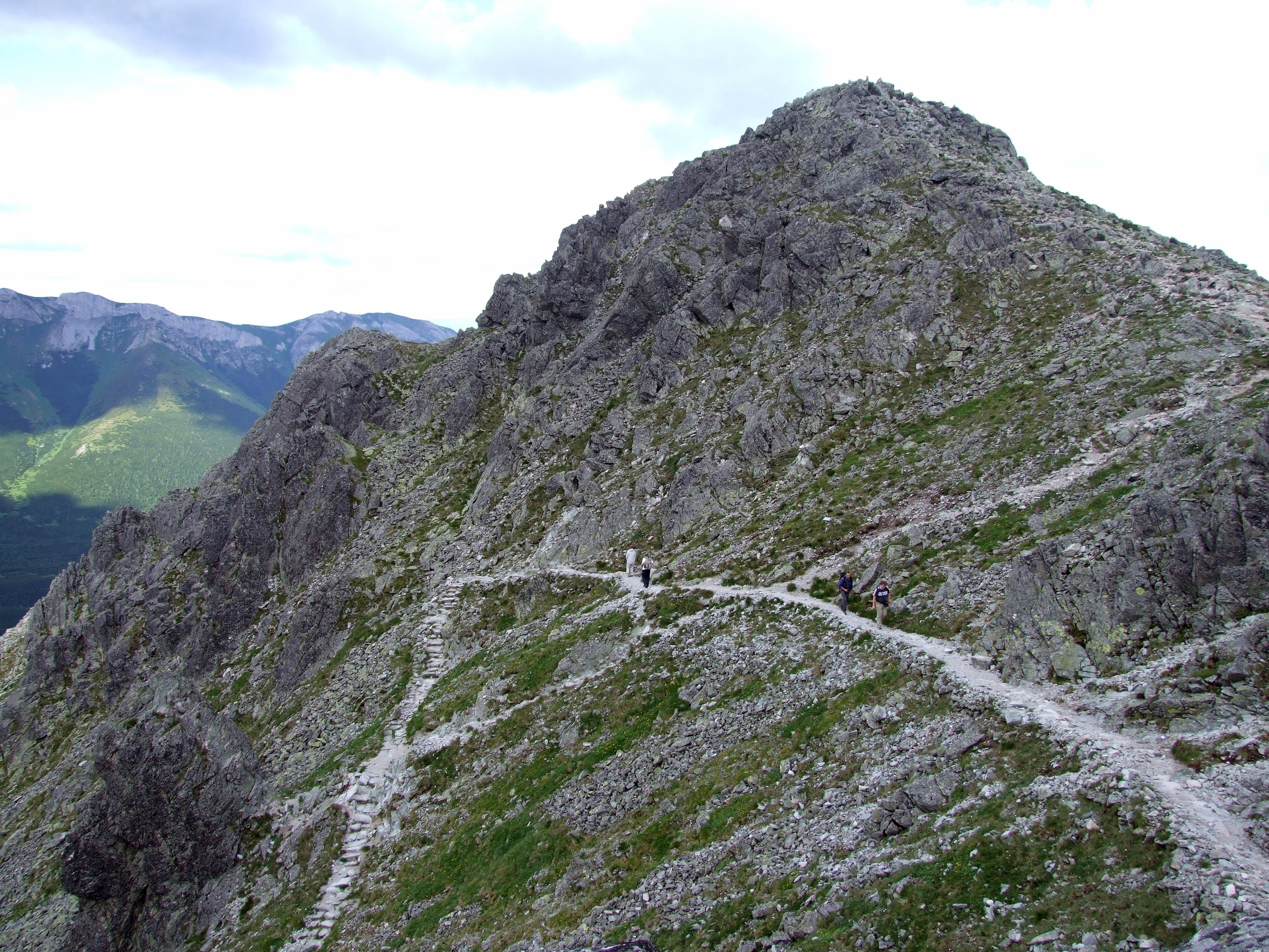 Czuba. W lewym dolnym rogu Lendacka Baba